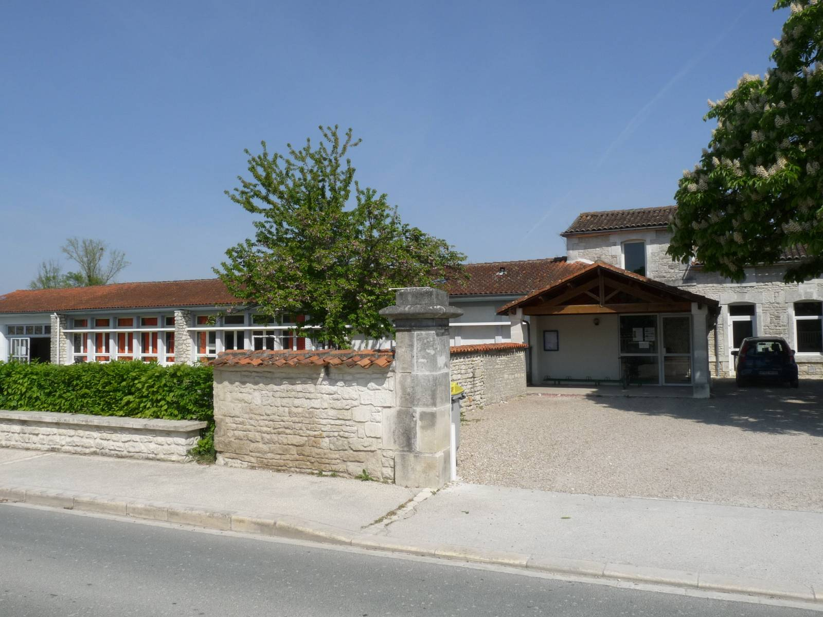 Ecole de Bréville, Charente, France